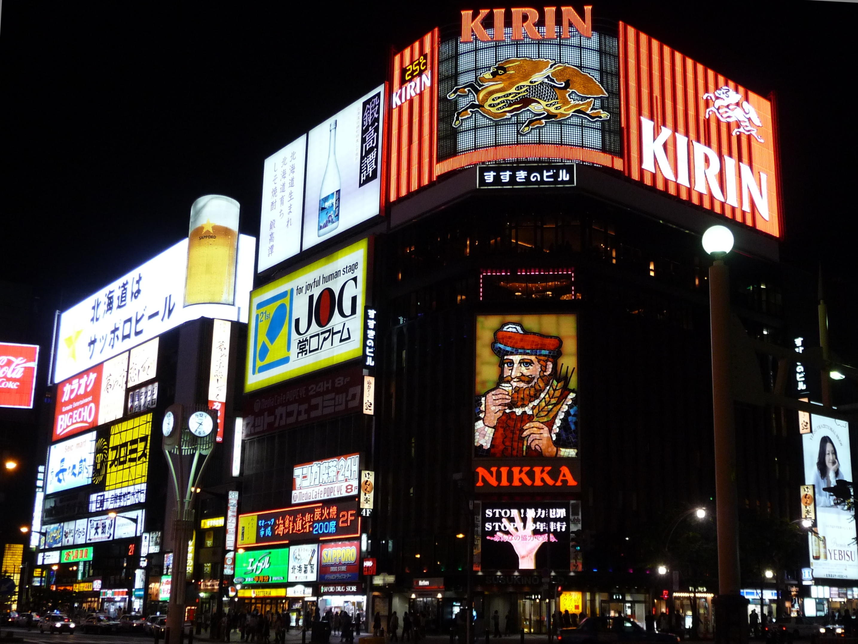 札幌市すすき野のネオンサイン